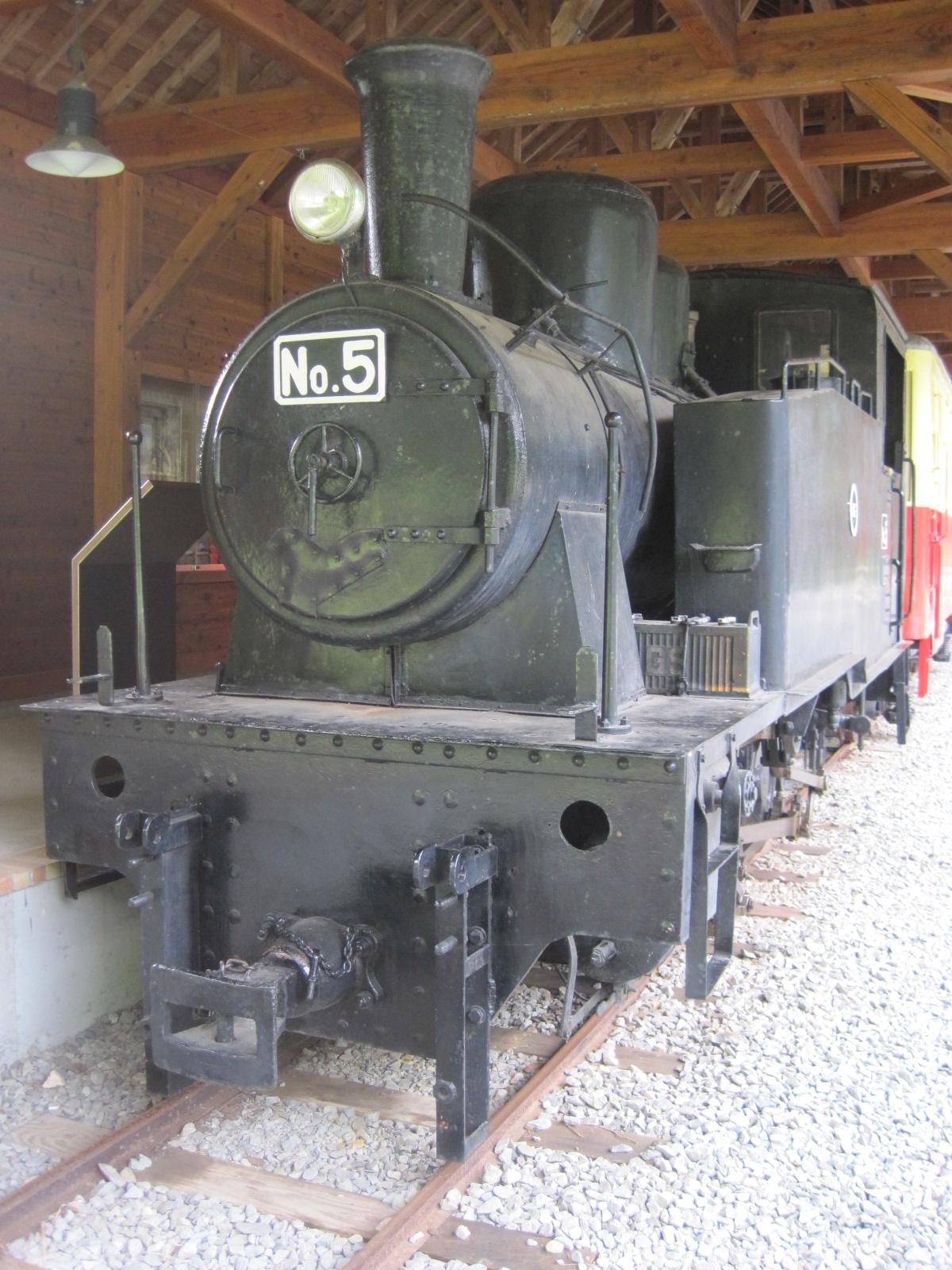 尾小屋鉄道の蒸気機関車5号